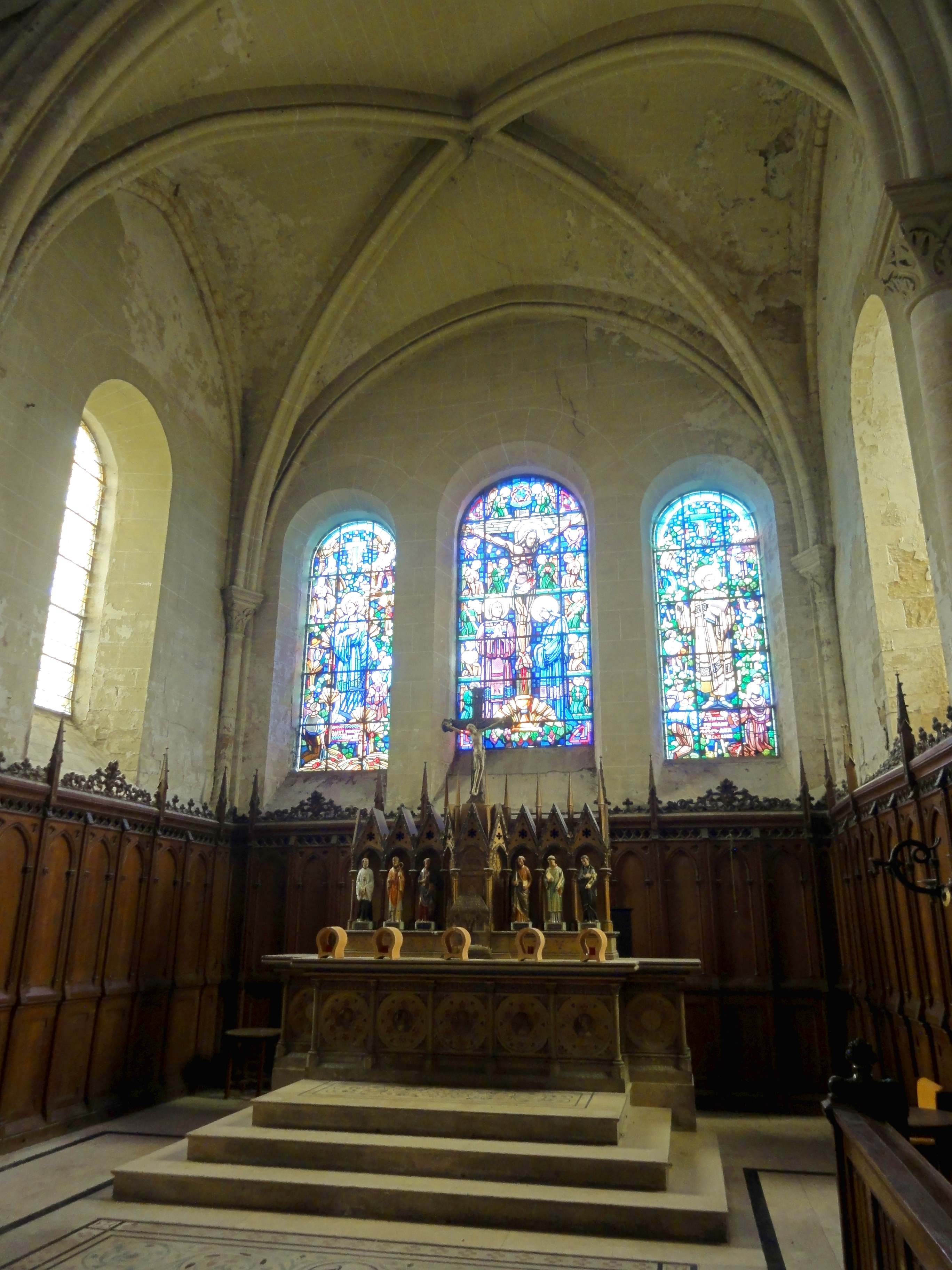 Voir titre.